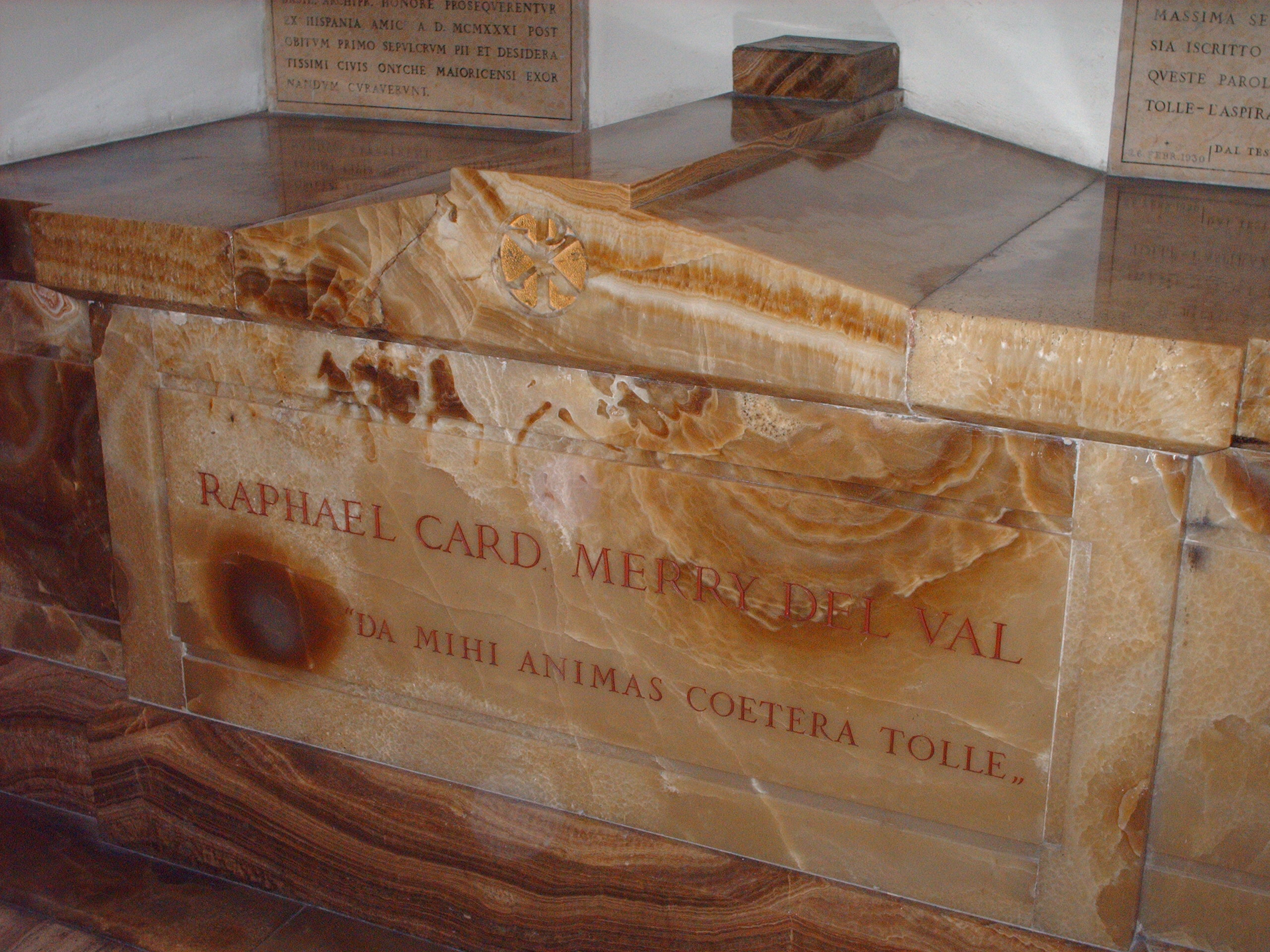 Rafael Merry del Val tomb, "grotte vaticane", Basilica di San Pietro